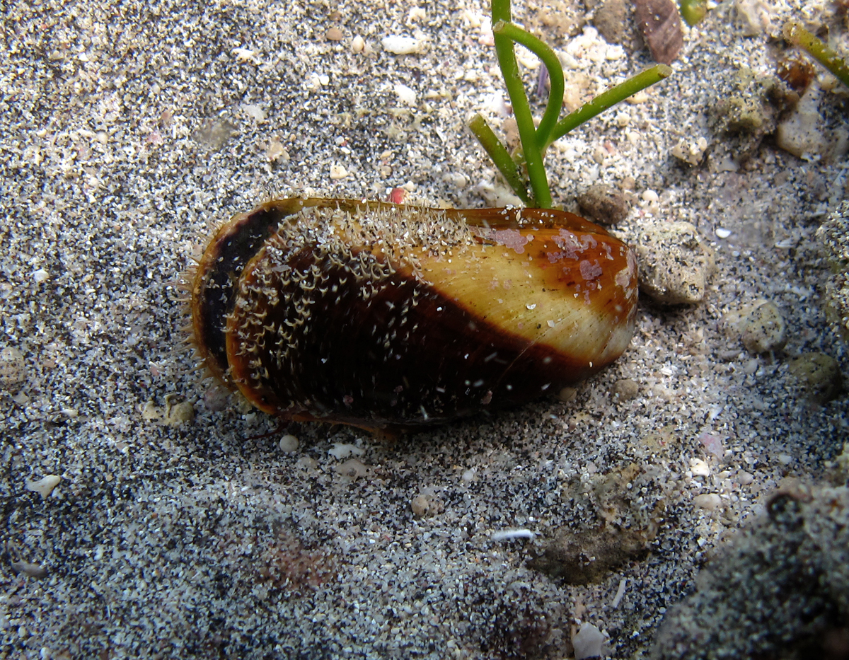 Une valve de Modiolus auriculatus.